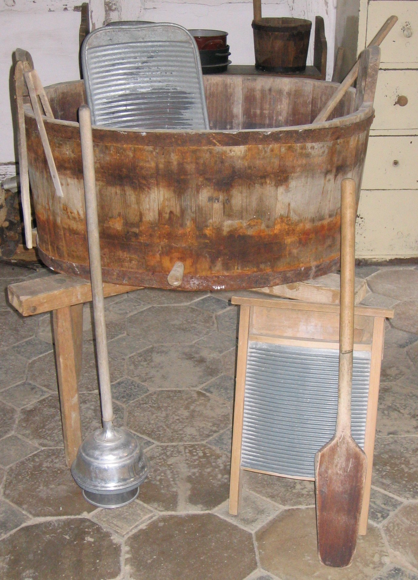 Zubehör aus der Waschküche im Freilichtmuseum Neuhausen ob Eck: Handpaddel Waschbretter Waschzuber (Behälter für Wasser und Wäsche) Wäschezangen (Herausziehen der Wäsche aus heißen Waschwasser) Wäschestampfer (Bespritzen der Wäsche, damit Schmutz abgeht)